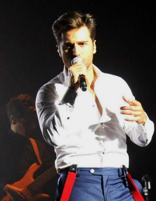 Bustamante en concierto en Madrid (Teatro Circo Price, 24 de enero de 2015)